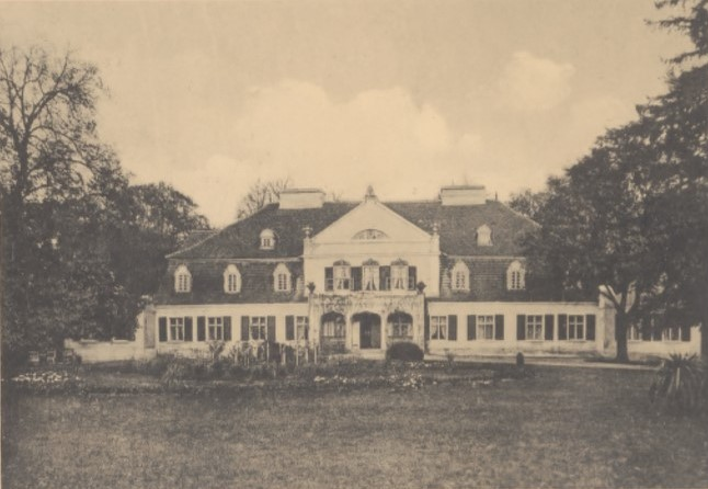 Dwór w Ujeździe za czasów Jana i Ludwiki z Niemirowiczów-Szczyttów hr. Żółtowskich, fot. z "Dwory Polskie w Wielkiem Księstwie Poznańskiem", Poznań 1912